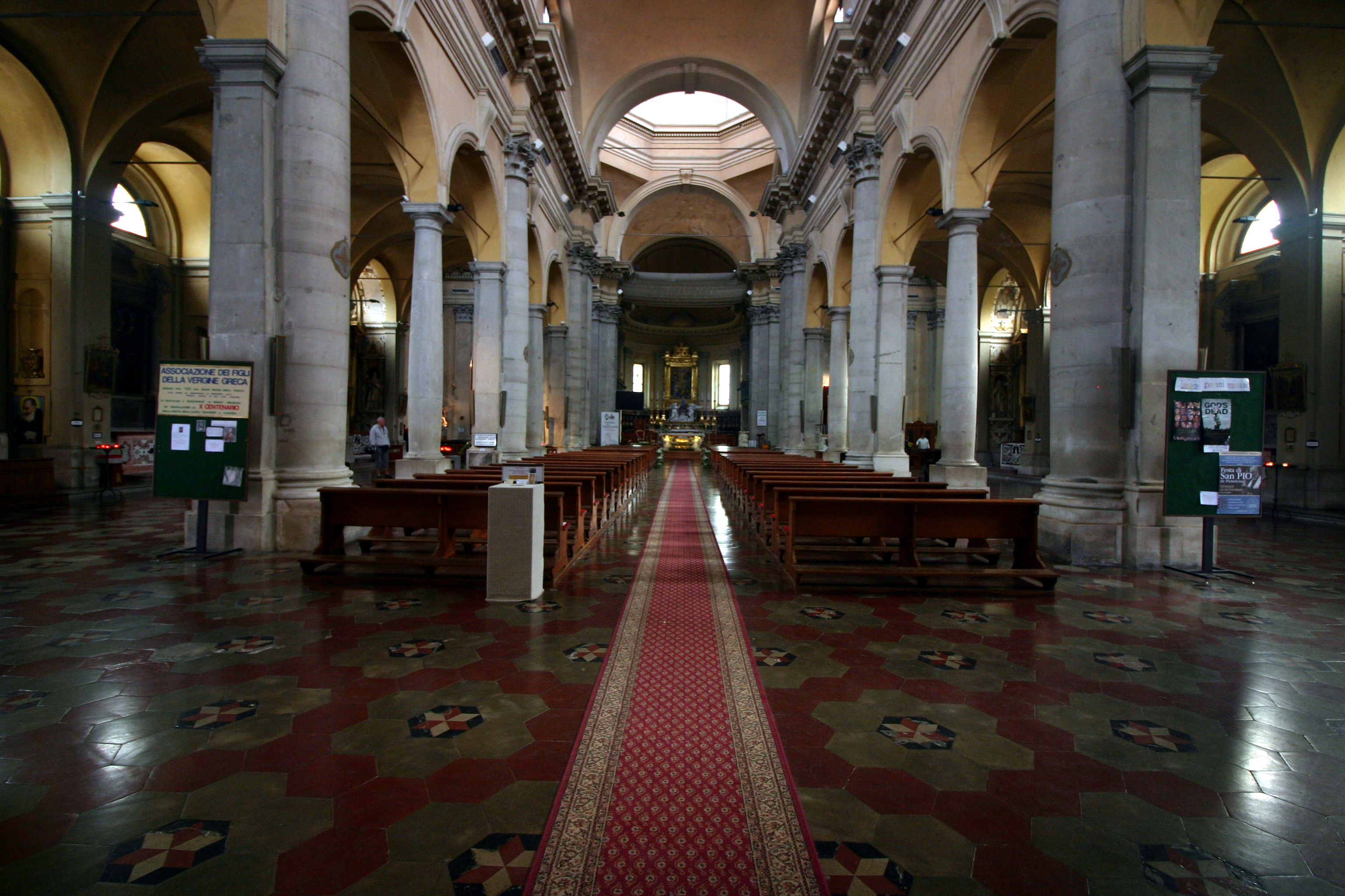 Santa Maria in Porto - Ravenna